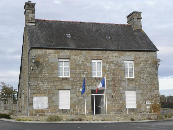 Mairie de Chauvigné (35) avant son transfert dans l'ancien presbytère.